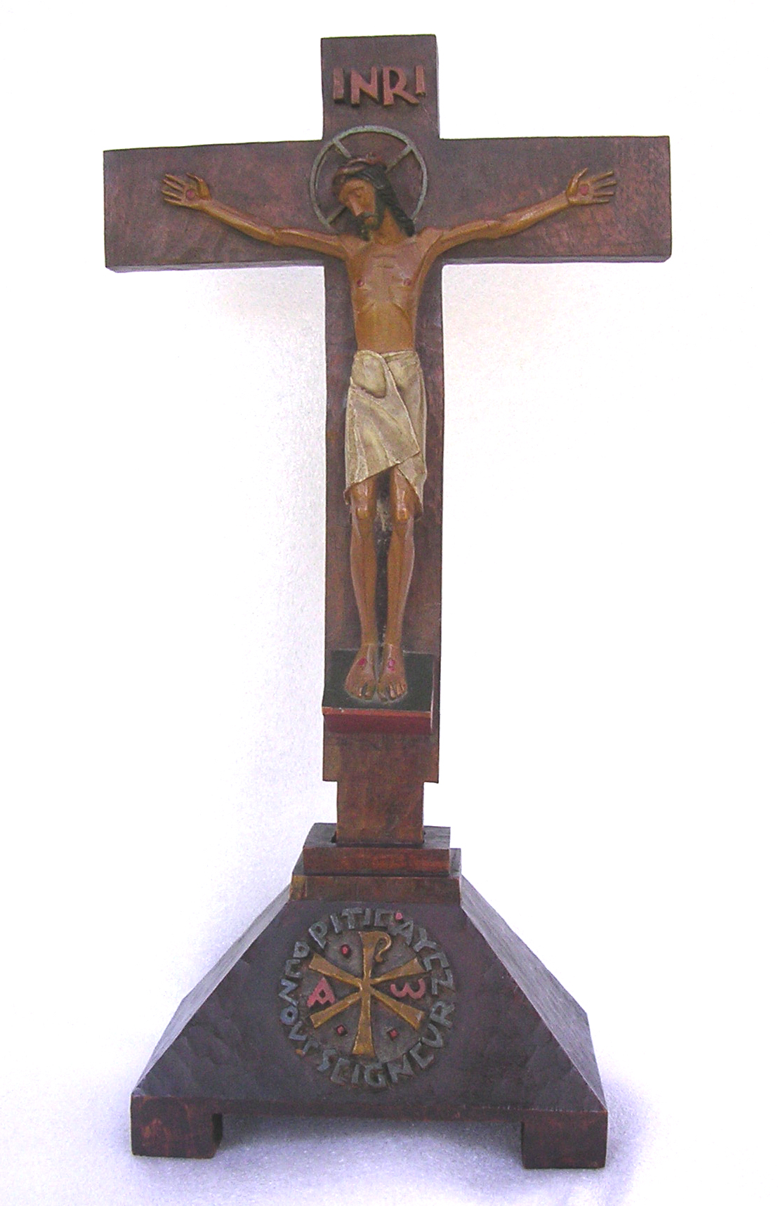 Crucifix, Fernand Py